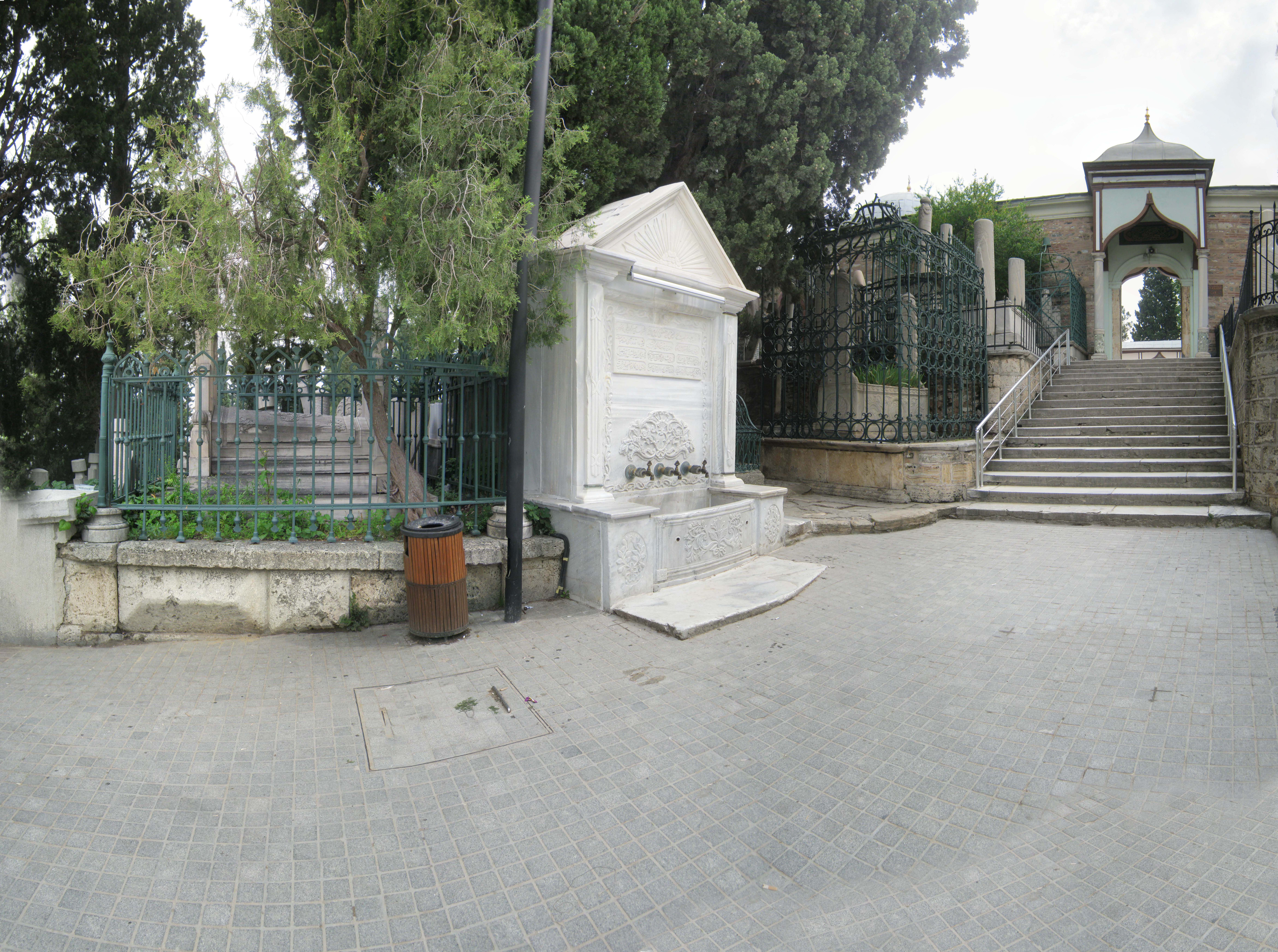 EMİRSULTAN BATI KAPISINDAKİ TARİHİ SOKAK ÇEŞMESİ